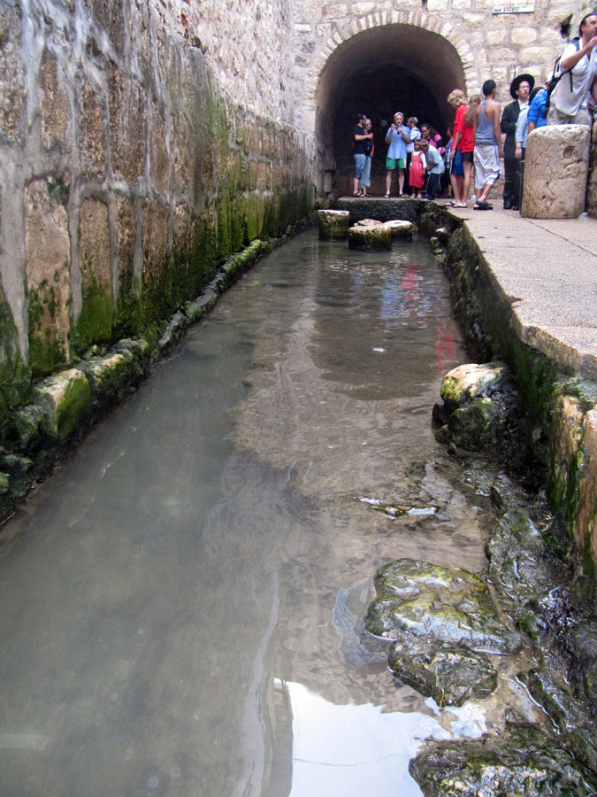 Byzantine Pool of Siloam בריכת השילוח הביזנטית